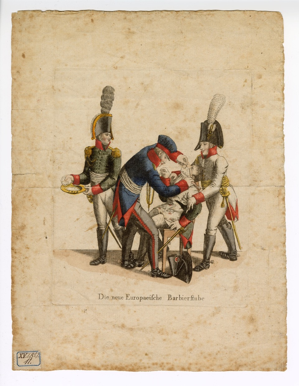 Karikatur (Radierung koloriert) „Die neue Europäische Barbierstube“, Grafik zur Völkerschlacht Leipzig, abgebildete Personen : Napoleon, Franz I., Friedrich Wilhelm III., Alexander I.